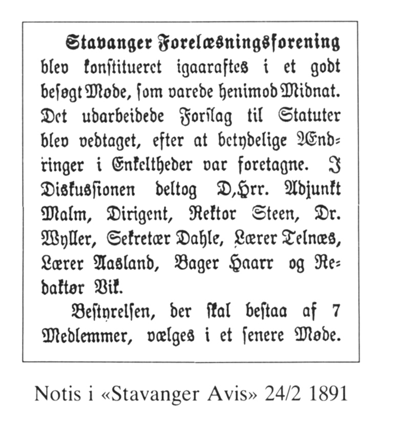 Notis om stiftelsen av Stavanger Forelesningsforening, Stavanger Avis, 24/2 1891